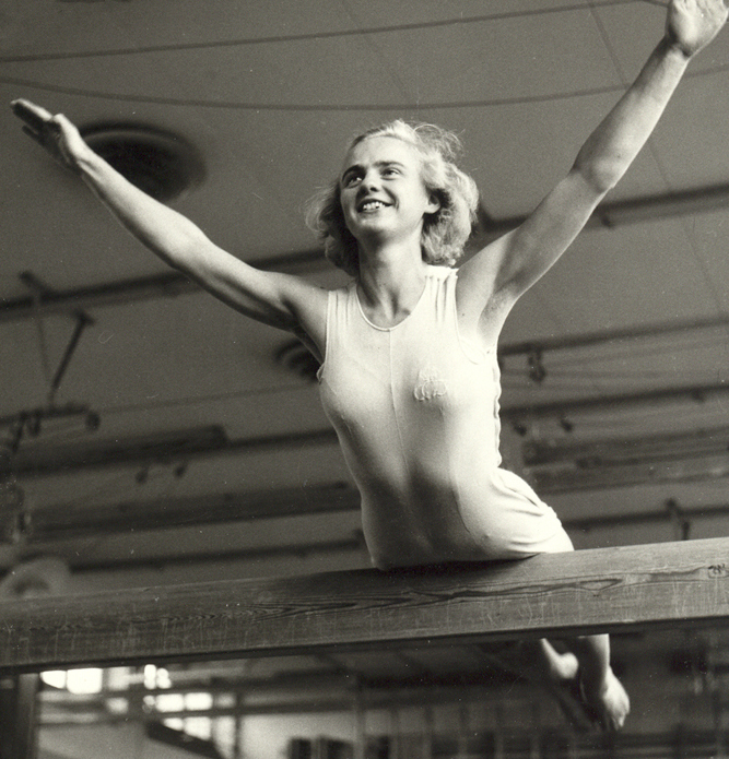 Karin Lindberg